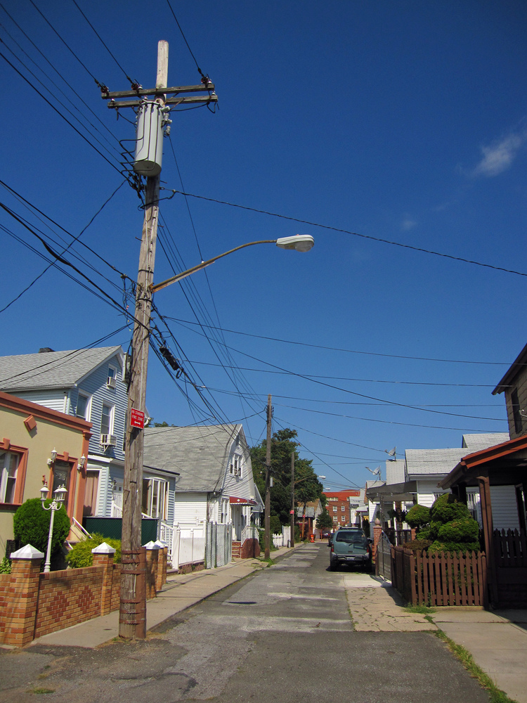 Canarsie bungalows